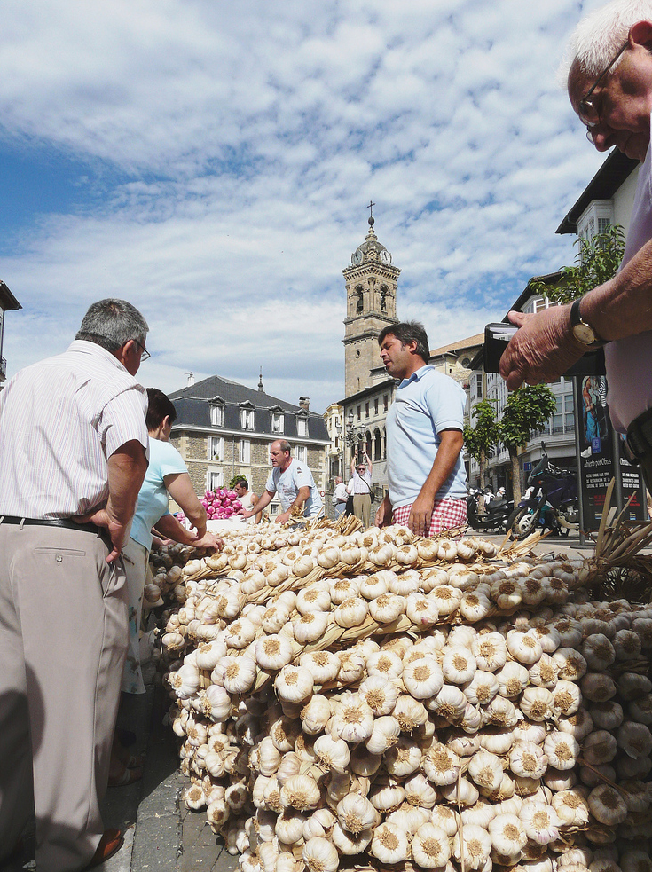 Baratxurien salmenta 2008ko Santiago egunean Gasteizen